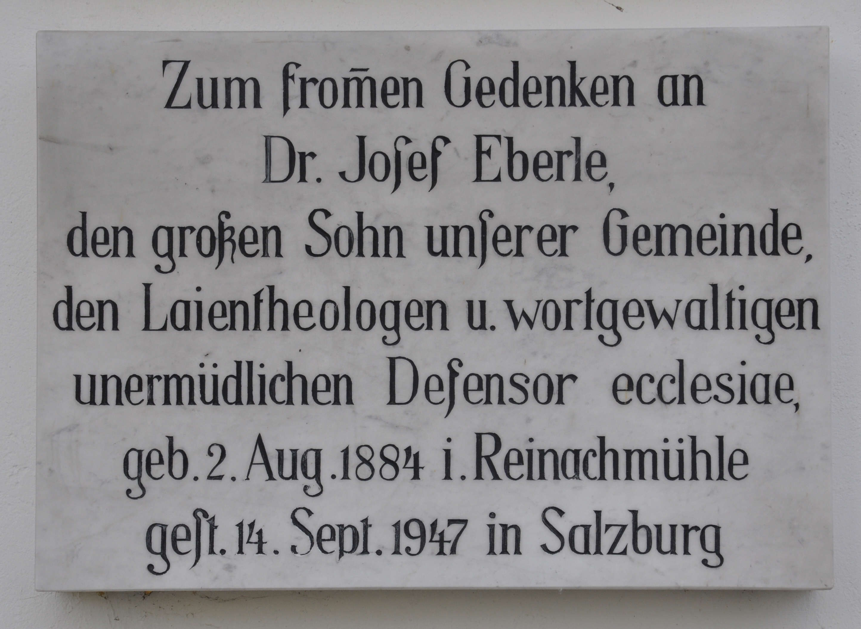 Friedrichshafen, Ortsteil Ailingen, Friedhof, Gedenkstein für Dr. Joseph Eberle (1893-1947)